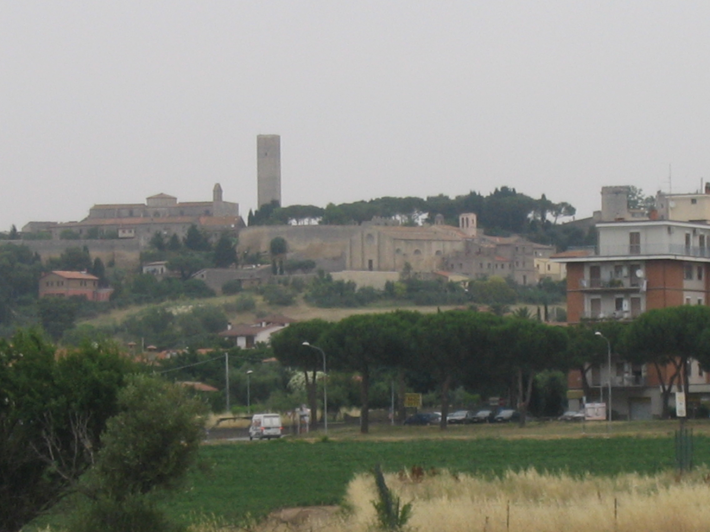 Tarquinia, Lazio, Italia